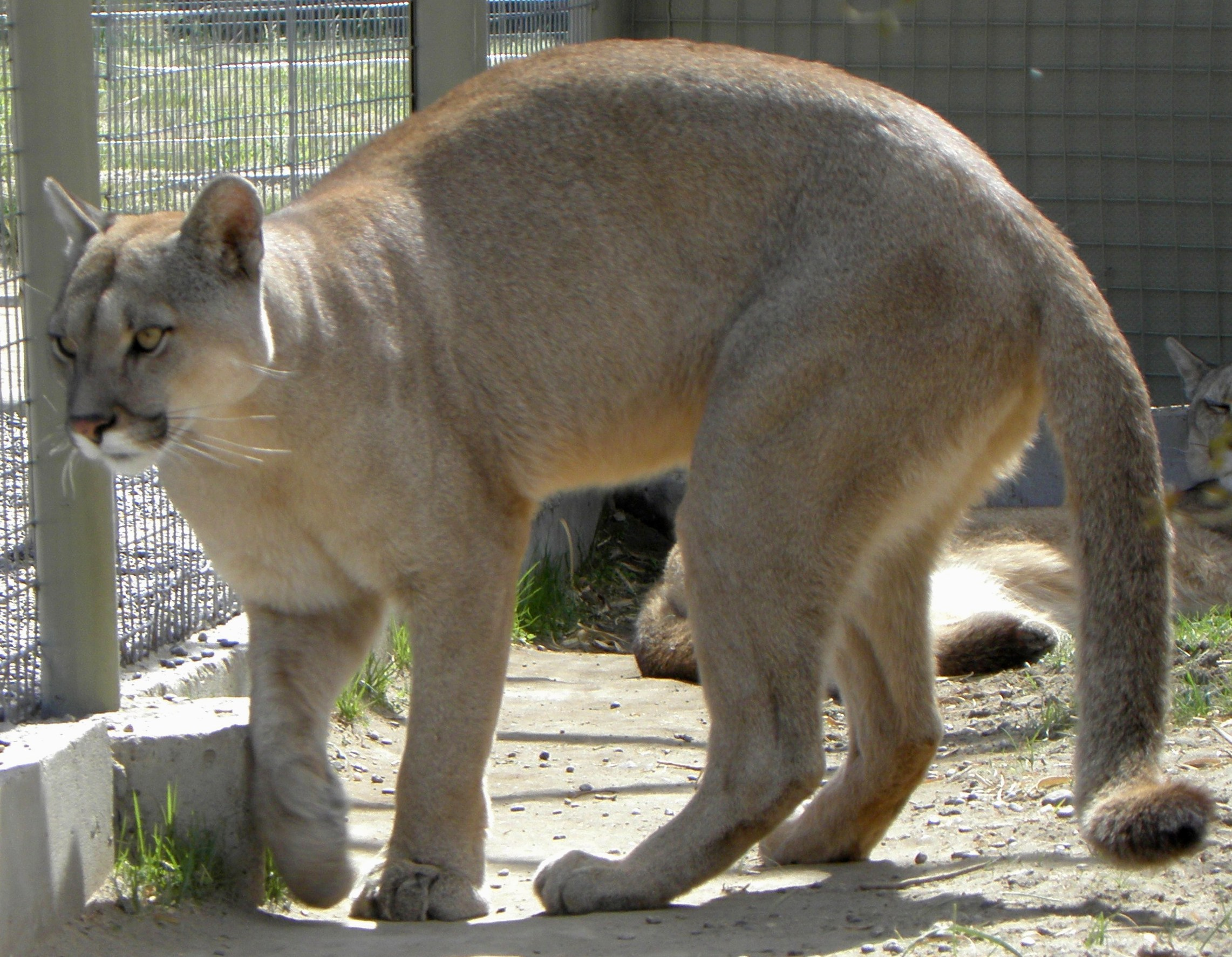 Puma concolor puma.